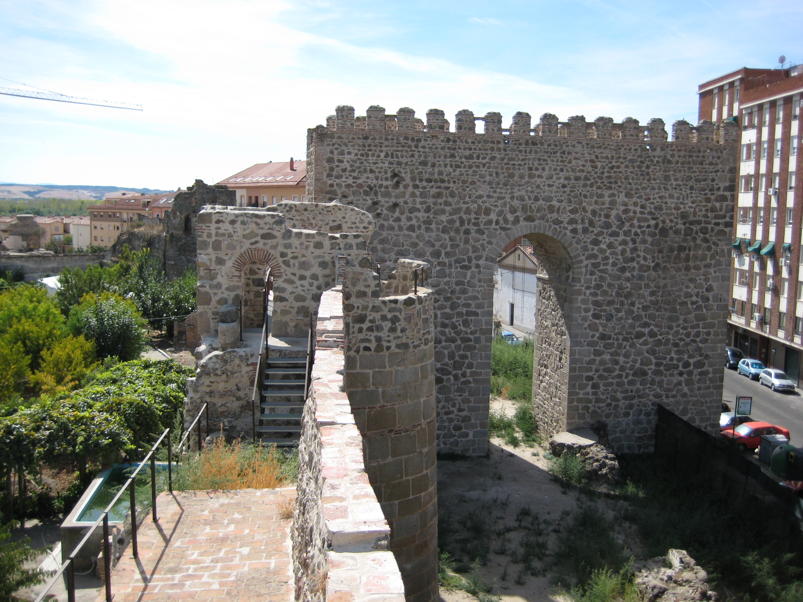 Muralla del monasterio de San Benito en Talavera de la Reina, España